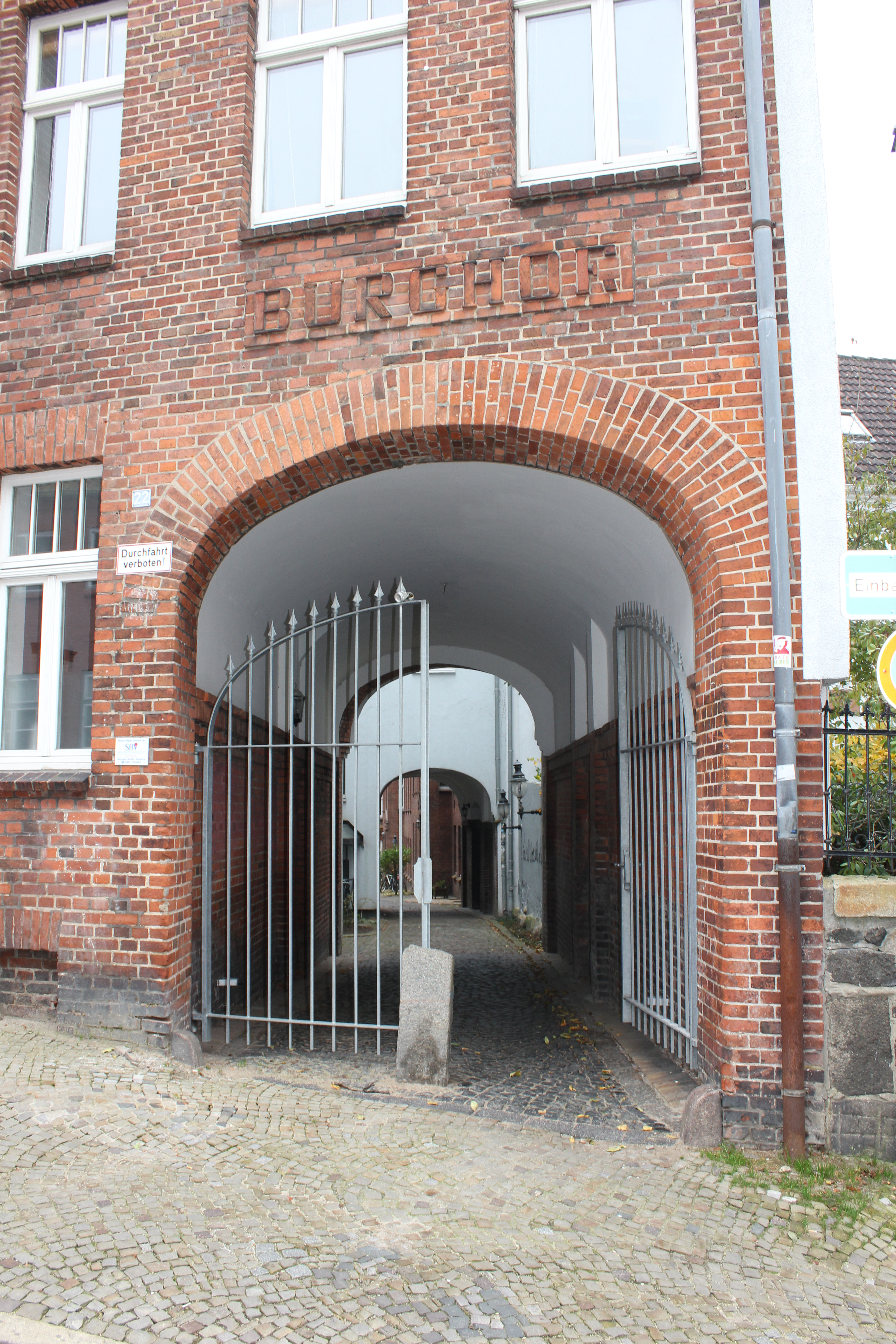 Burghof von der Marienstraße aus (Flensburg)